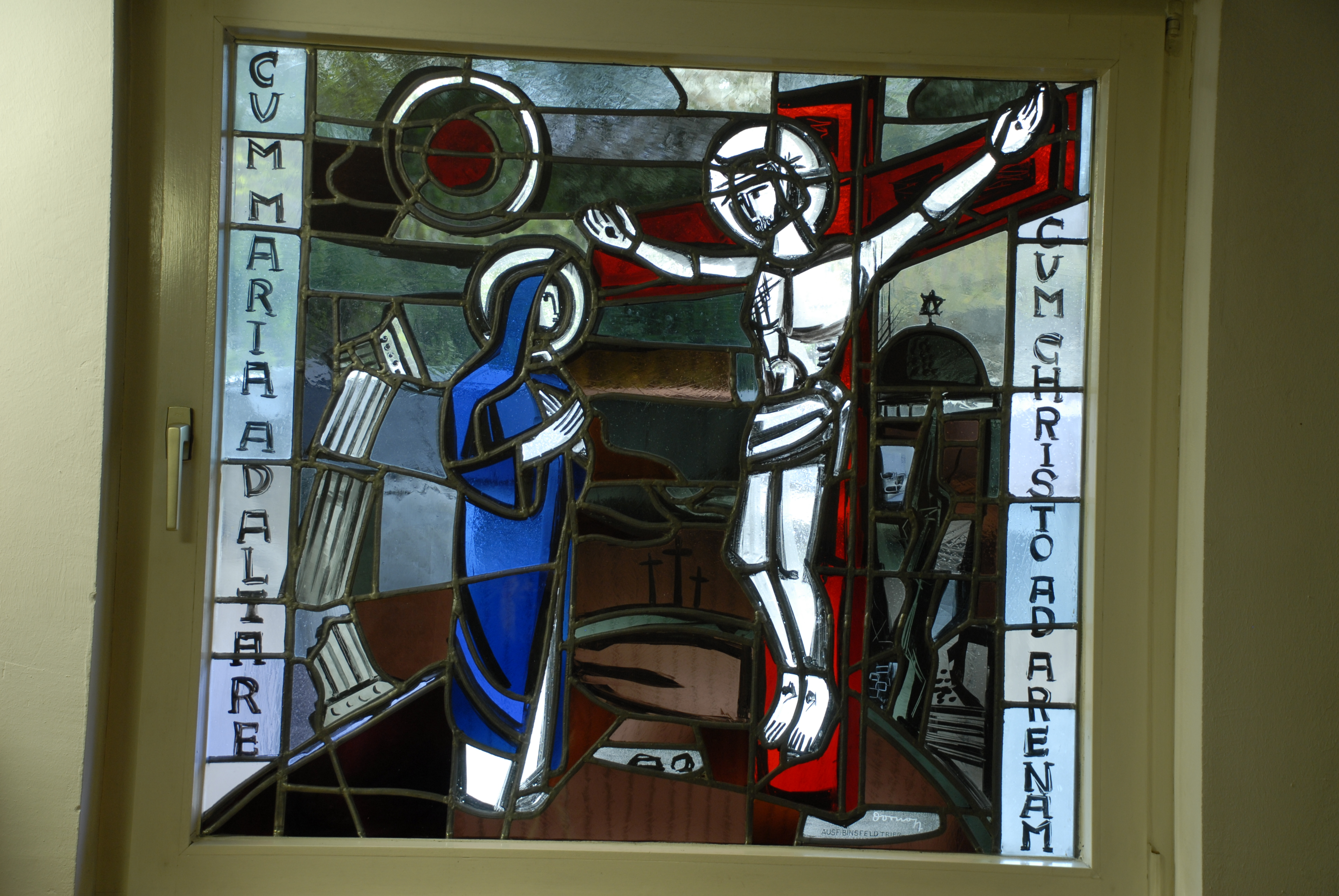 Motivaufnahme aus der Sakristei